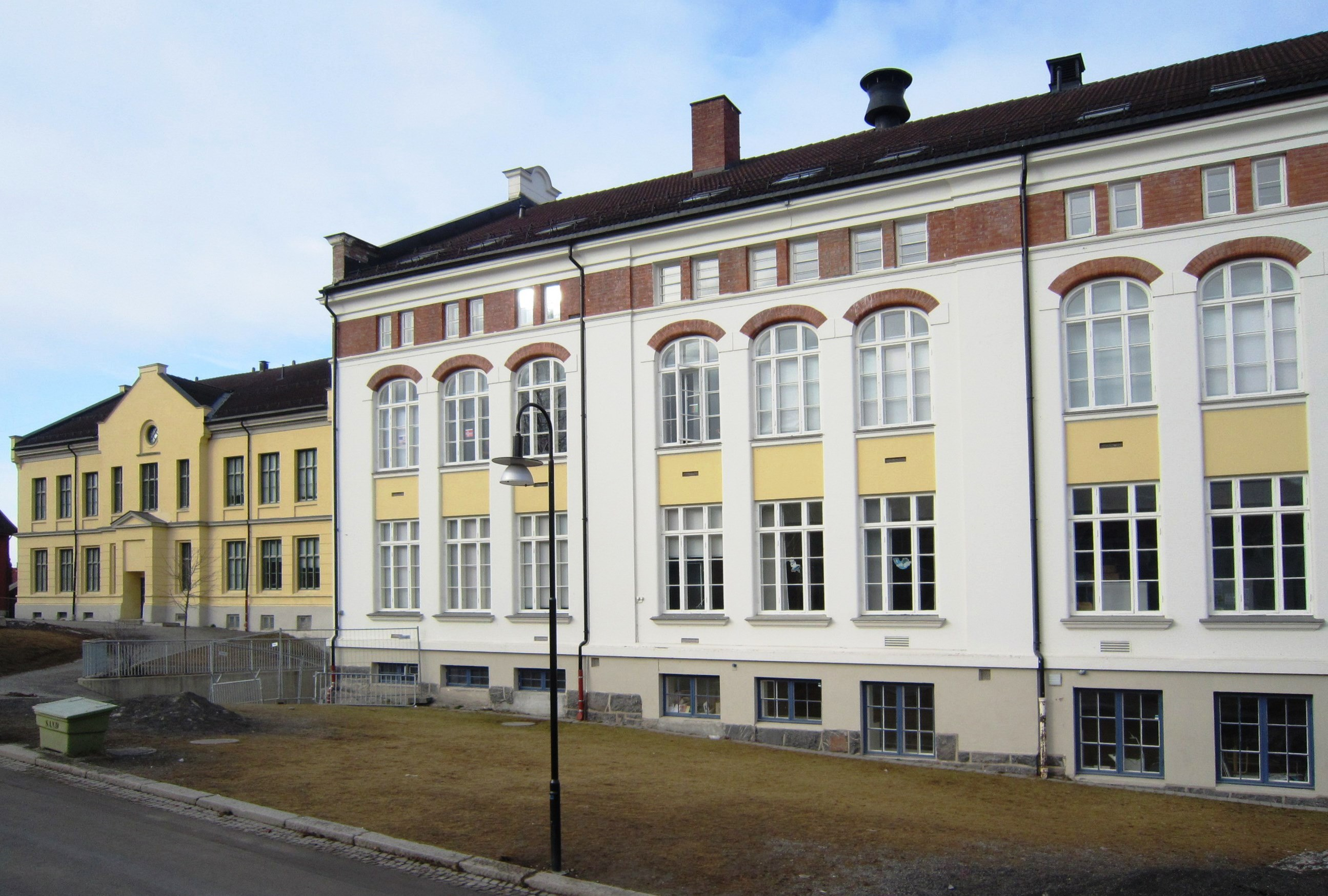 Hammartun skole på Lillehammer (fra ungdomsskoledelen)